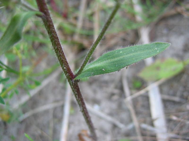 Blatt des Scharfen Berufkrautes Erigeron acris subsp. acris